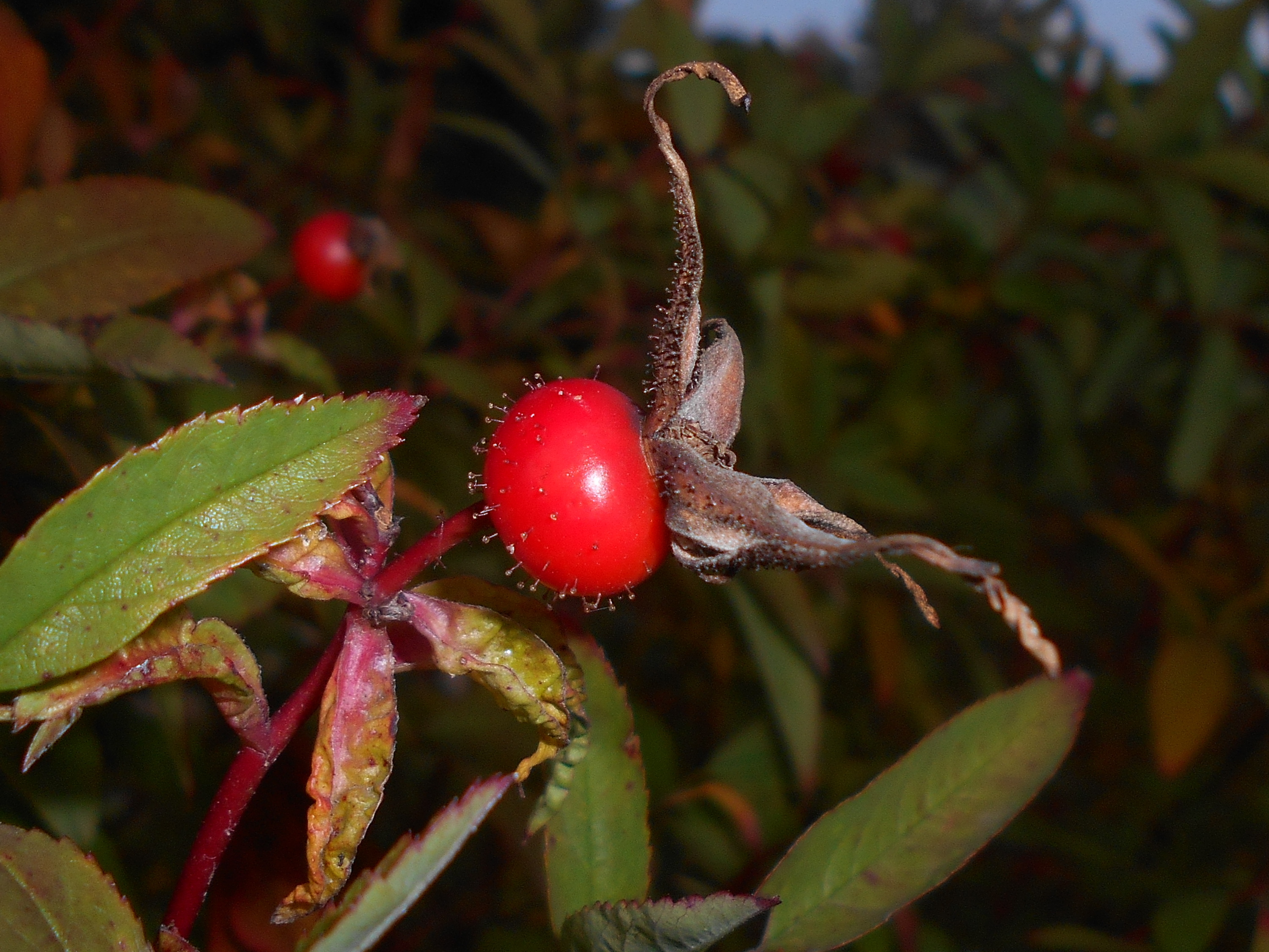 Róża błotna (Rosa palustris), Ogród Botaniczny Uniwersytetu Wrocławskiego.